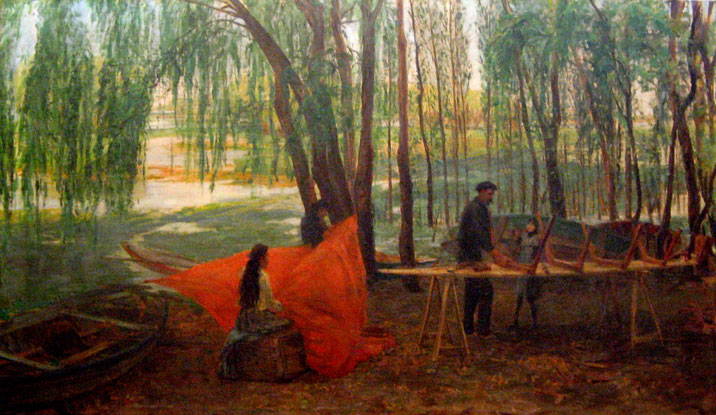 Tarea en el río